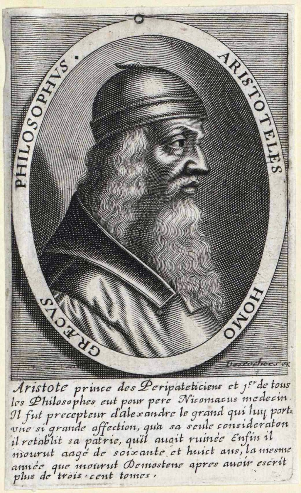 Aristoteles (384 v Chr - 322 v Chr)